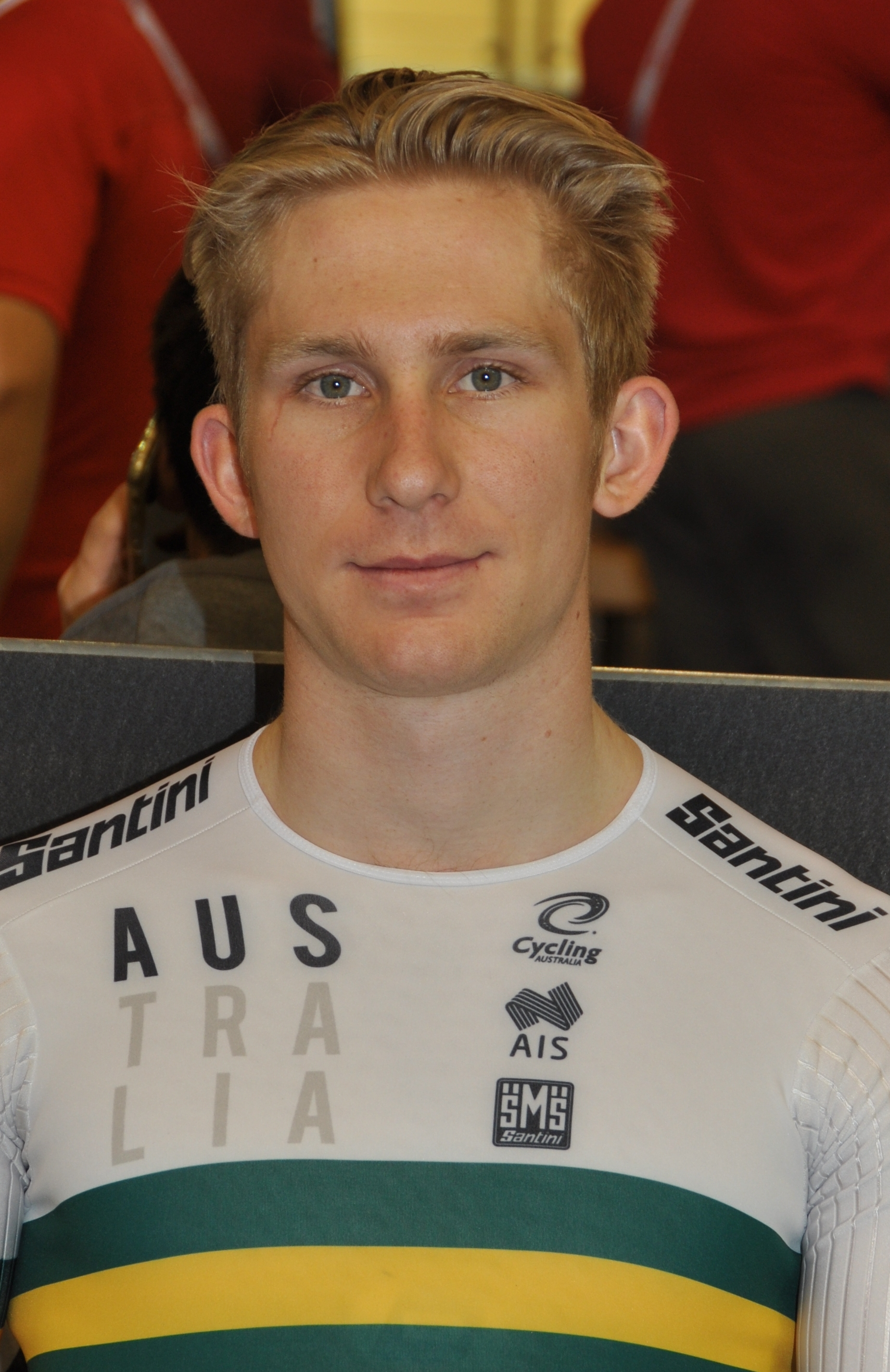 Cameron Scott, australischer Radsportler